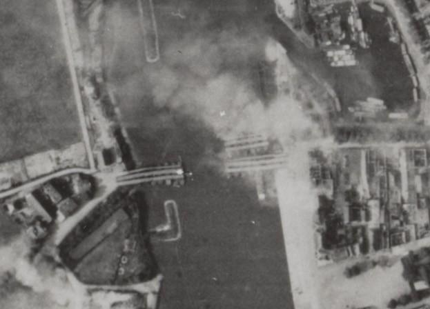 Luchtopname [Operatie Market Garden] Gevechten op Onderlangs-Bovenover in Arnhem. Om de ingesloten parachutisten bij de brug in Arnhem beginnen vier Britse bataljons in de vroege ochtend van 19 september een aanval via de wegen Onderlangs en Bovenover. Deze aanval mislukt. Op de luchtfoto die omstreeks het middaguur is gemaakt, zie we aan de rookwolken waar gevochten wordt; op Bovenover, oostelijk van de Oude Haven bij de Schipbrug en in de omgeving van de verkeersbrug. De brand in het Paleis van Justitie aan de Markt veroorzaakt zo'n reusachtige rookwolk dat een deel van de binnenstad en het land aan de overzijde van de rivier eronder schuil gaan